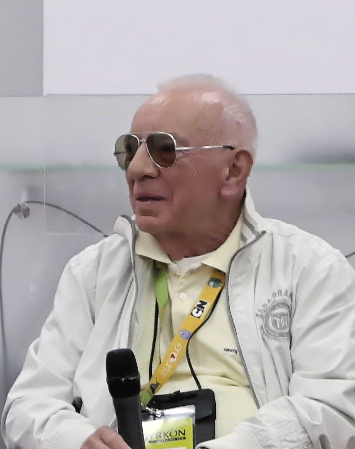 Reżyser Marek Piestrak, Pyrkon, Poznań 2015